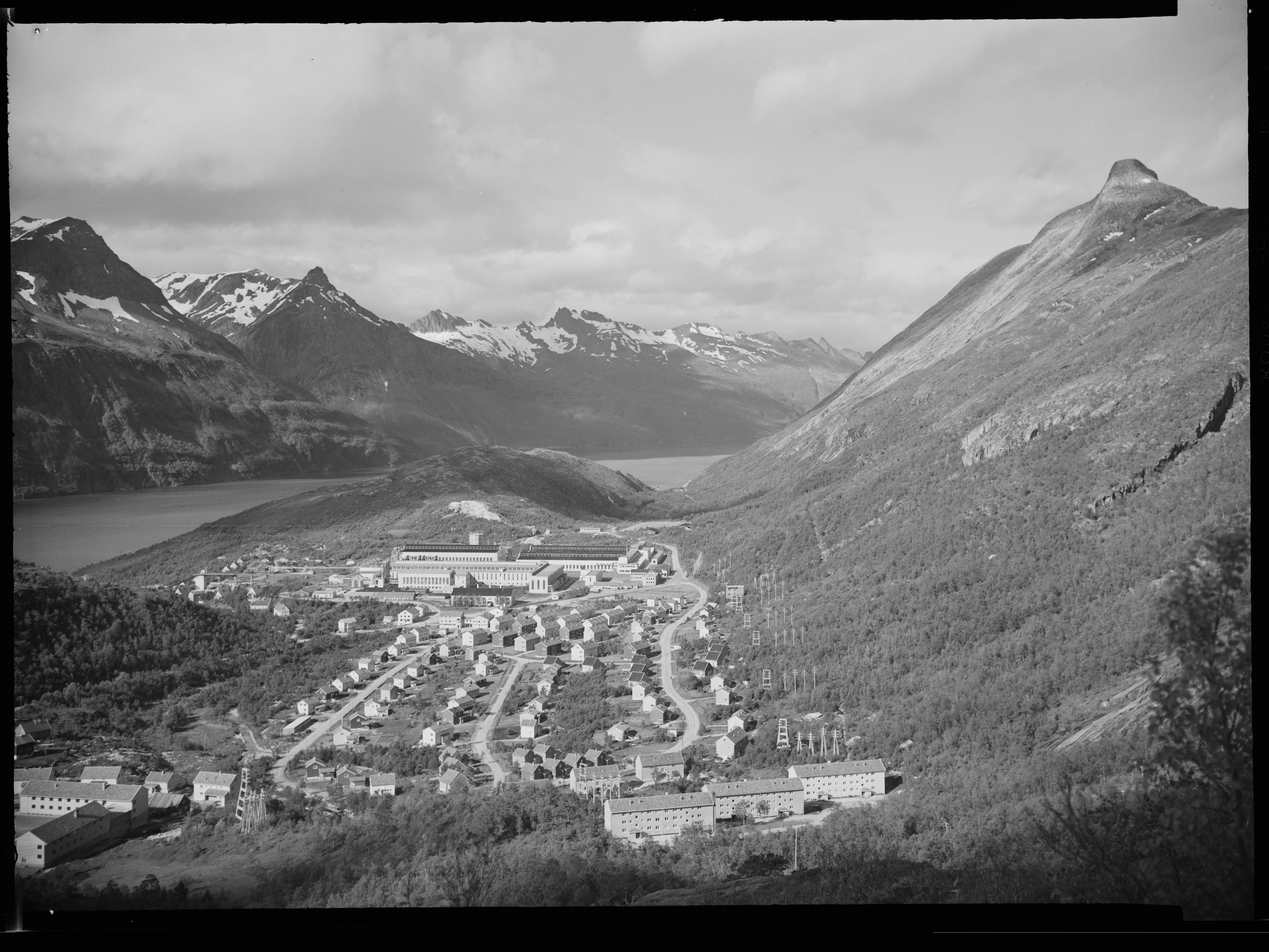 Bildet er hentet fra Nasjonalbibliotekets bildesamling. Anmerkninger til bildet var: Fotograf: L.S Glomfjord, Meløy, Nordland